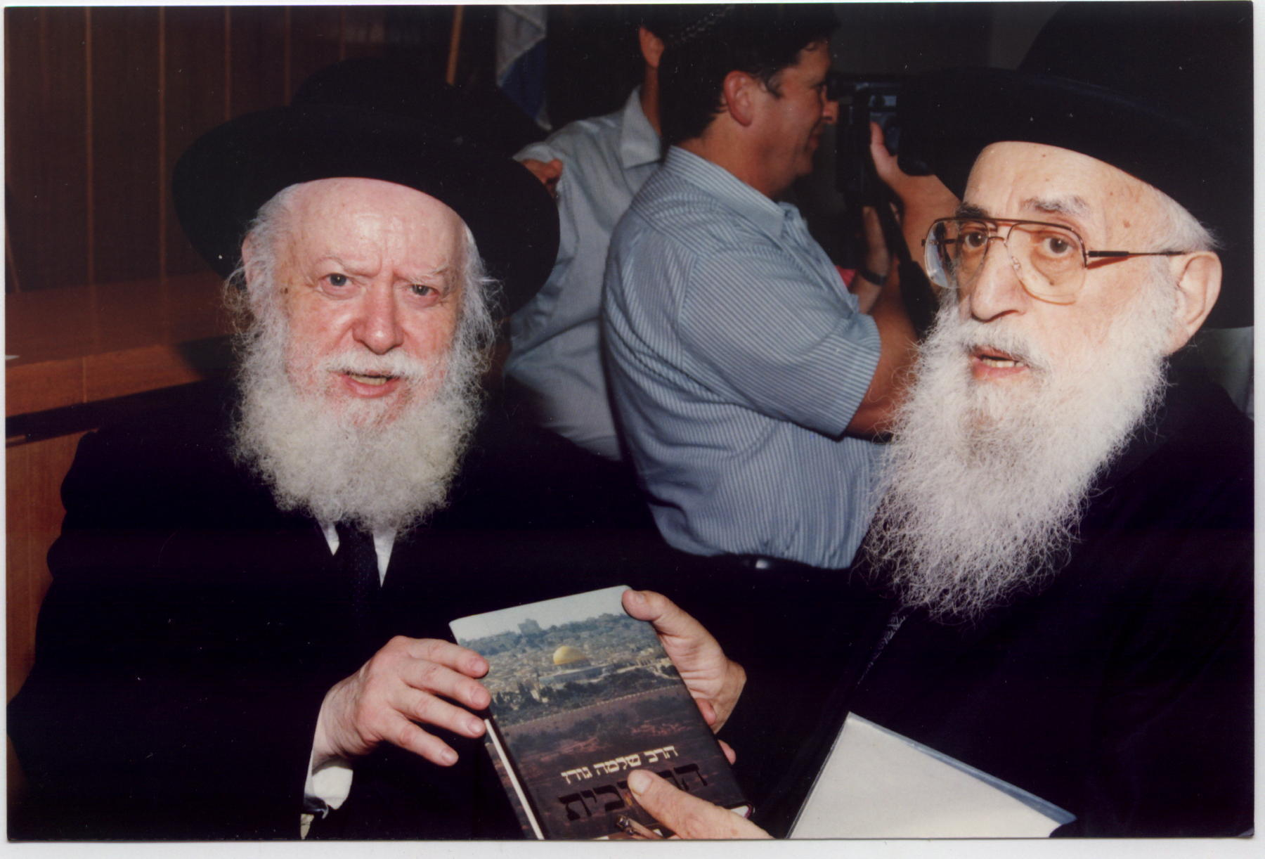 הרב גורן יחד עם הרב שפירא בהוצאת ספרו של הרב גורן